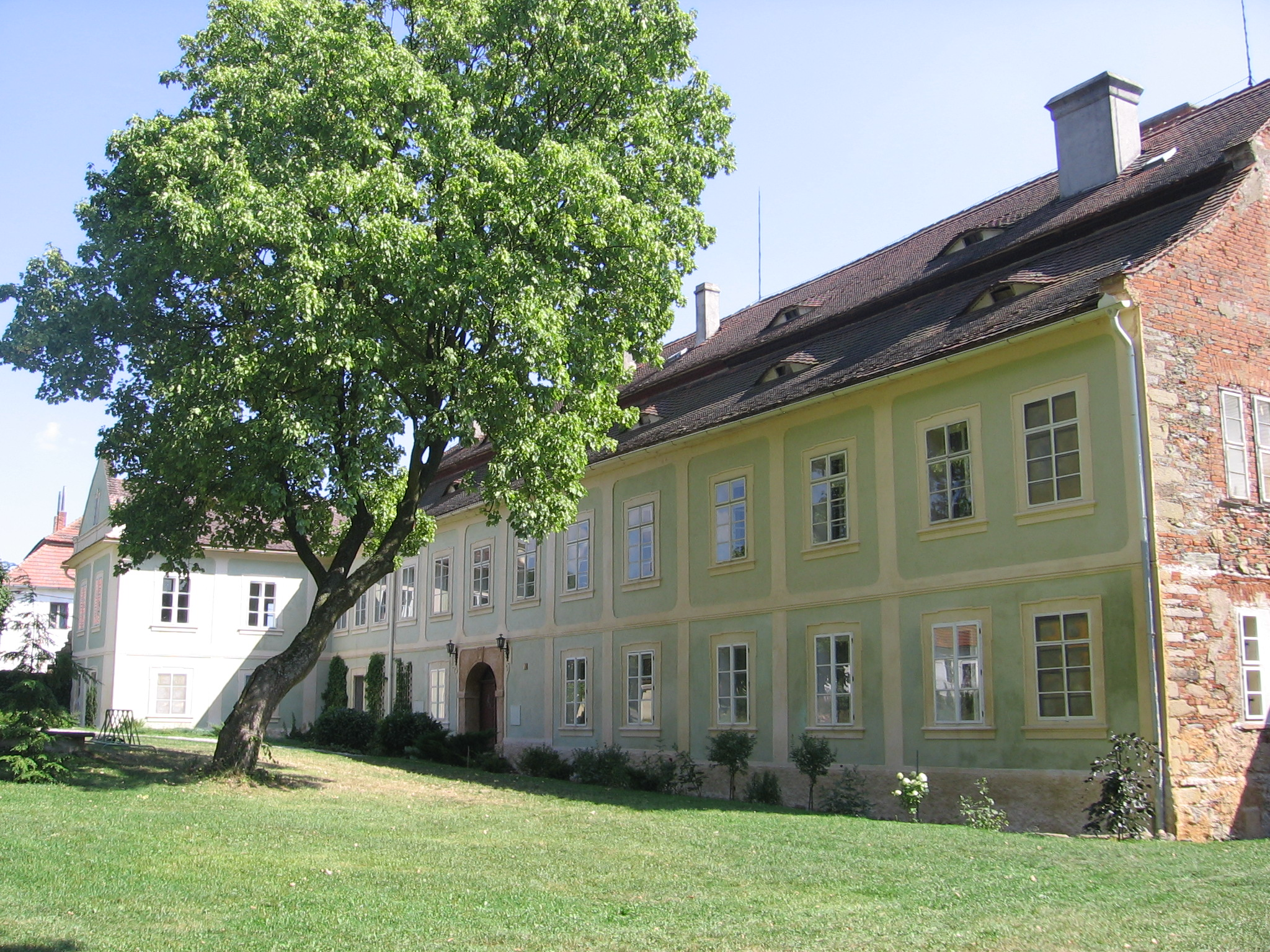 Zámek Luhov, okres Plzeň-sever